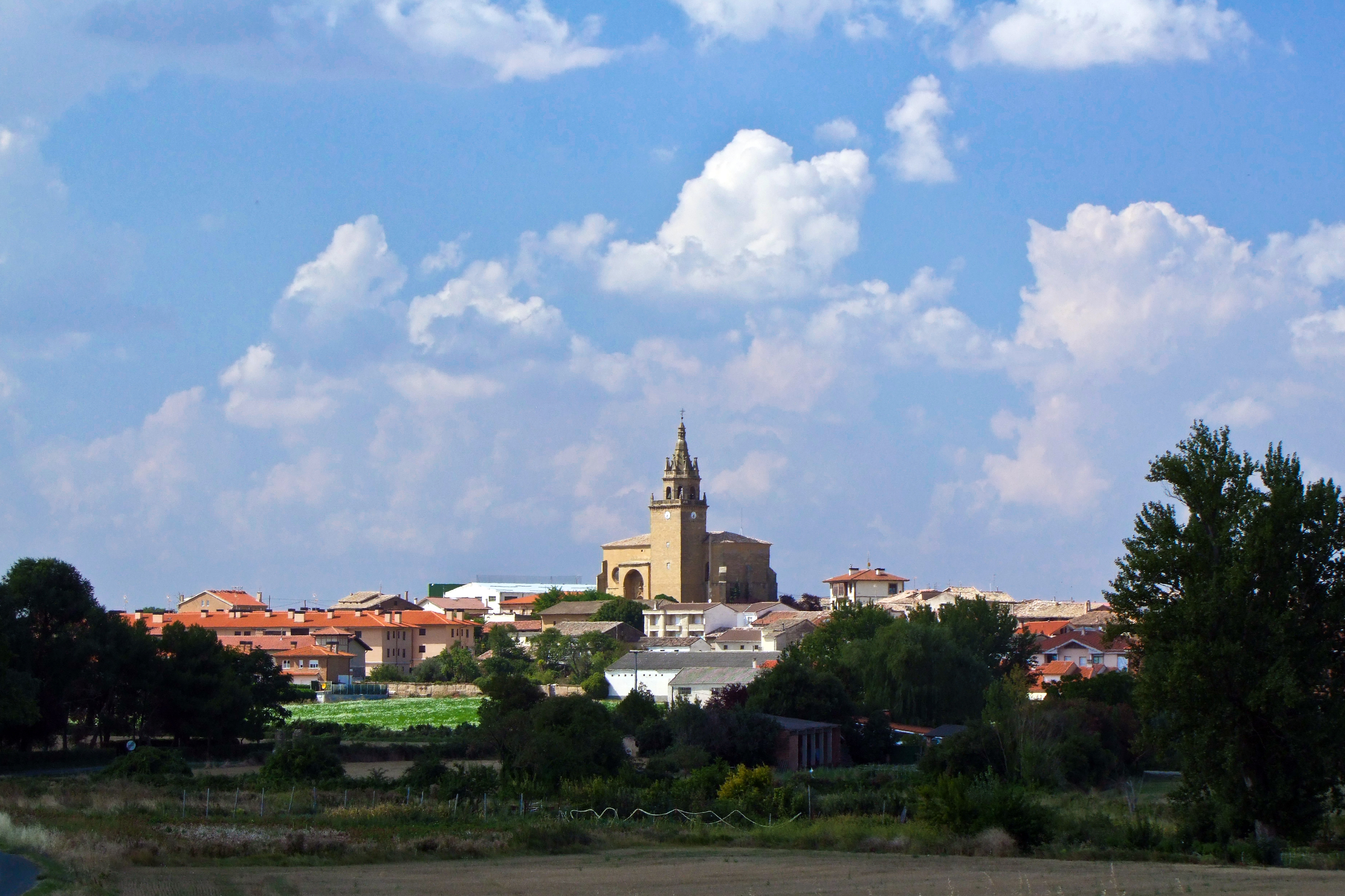 Zarratón.jpg